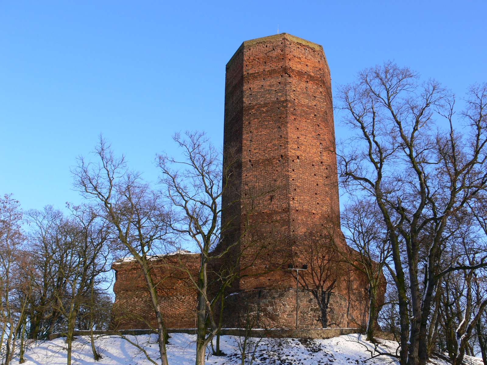 Kruszwica - Mysia wieża Autor - Bartek Wawraszko